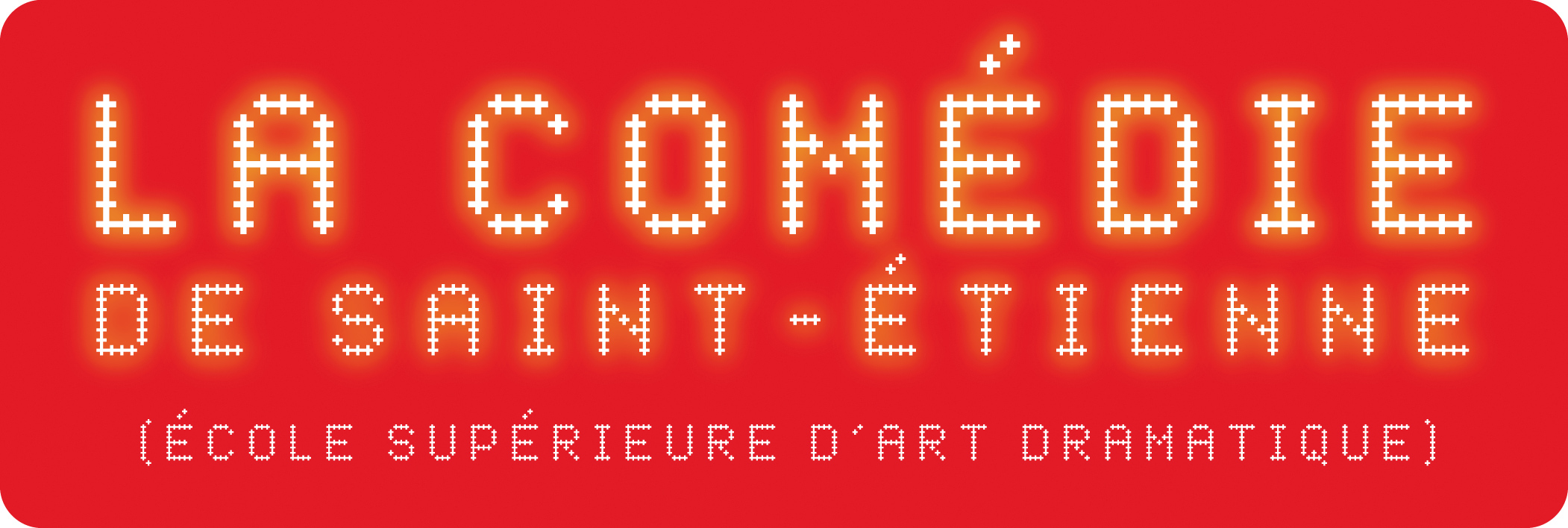 Logo de L'Ecole de la Comédie de Saint-Etienne